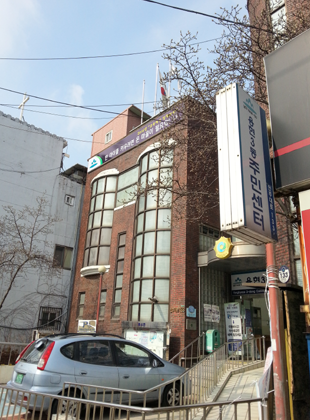 용현3동 주민자치센터. 인천광역시 남구 인주대로 133